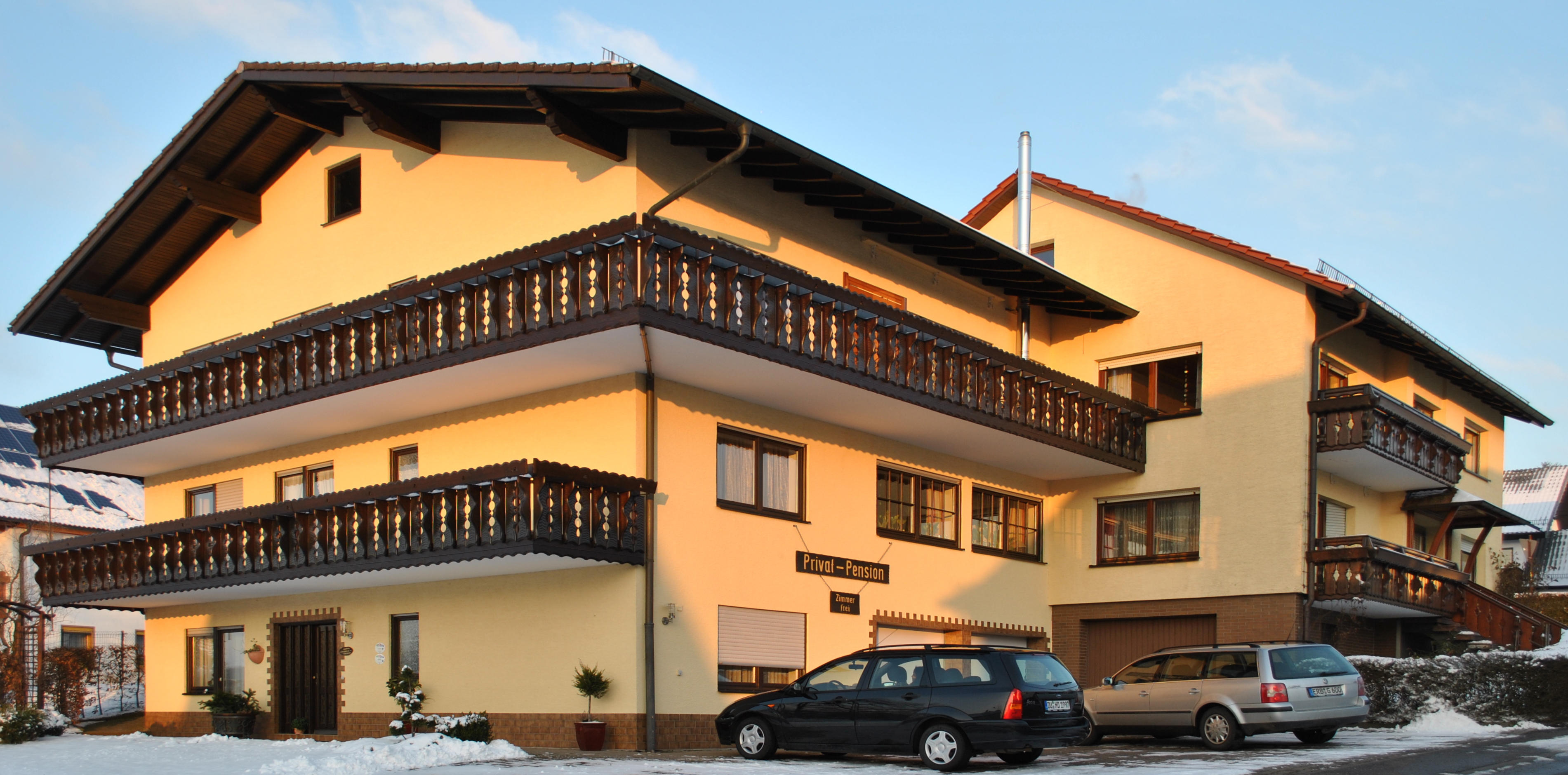 Pension mit Ferienwohnungen im Dorfzentrum von Hesselbach